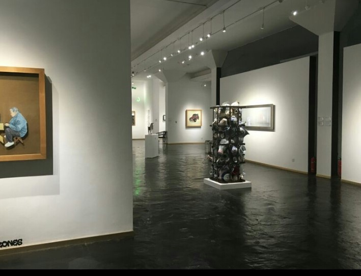 interior galería island6